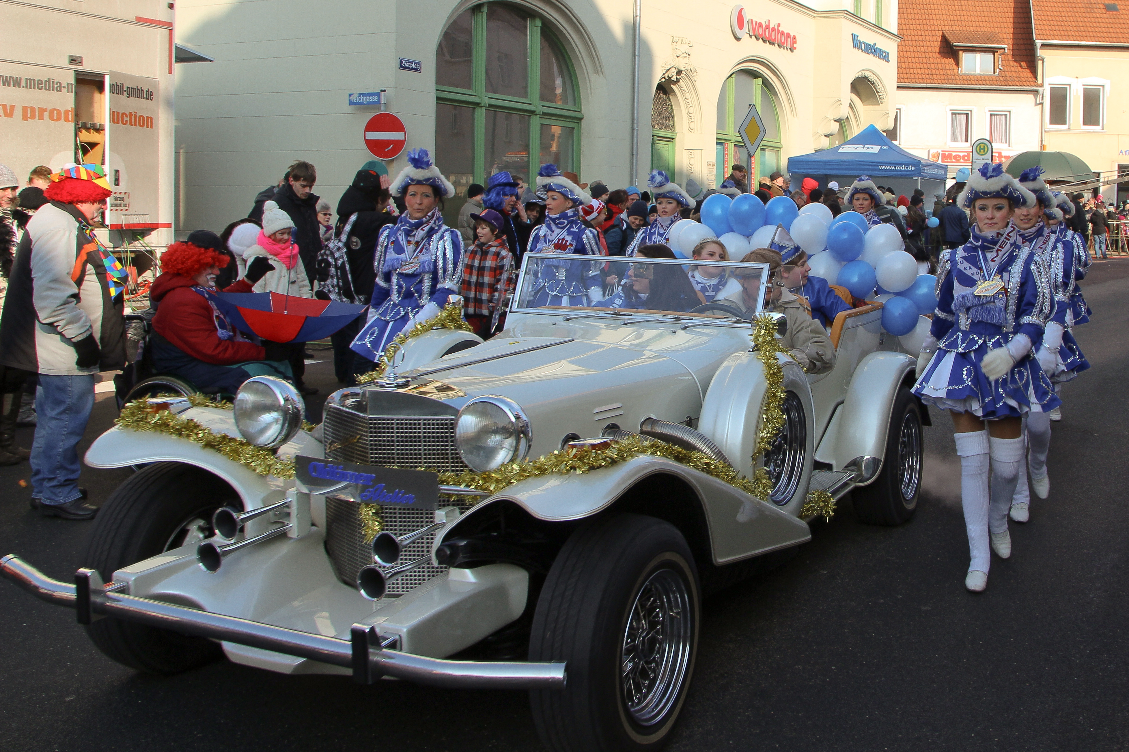 Das Prinzenpaar beim Rosenmontagsumzug in Köthen (Anhalt) 2013.